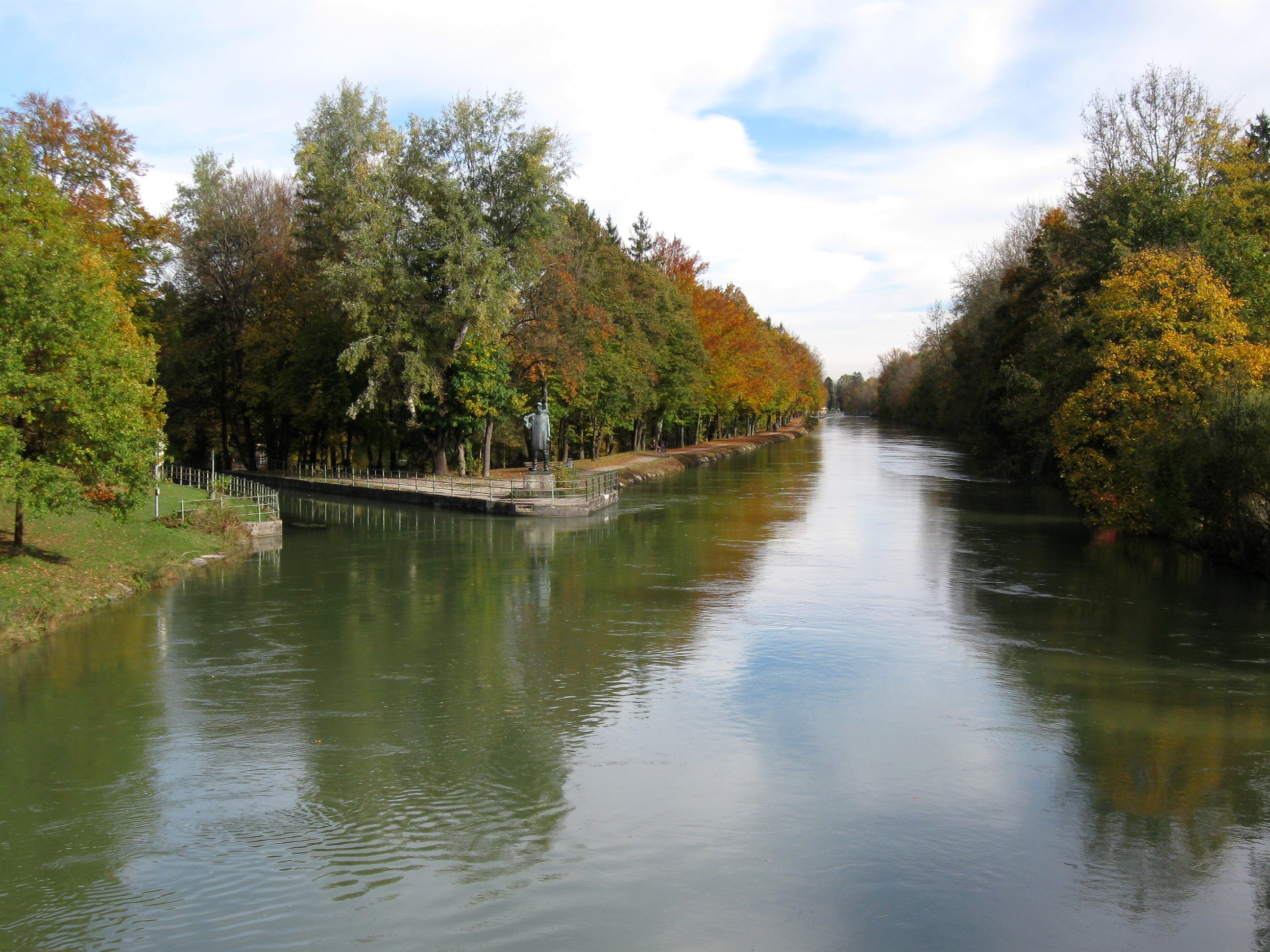 Abzweigung des Floßkanals (links) vom Isarkanal (rechts), Flößerdenkmal, Nähe Hinterbrühler See